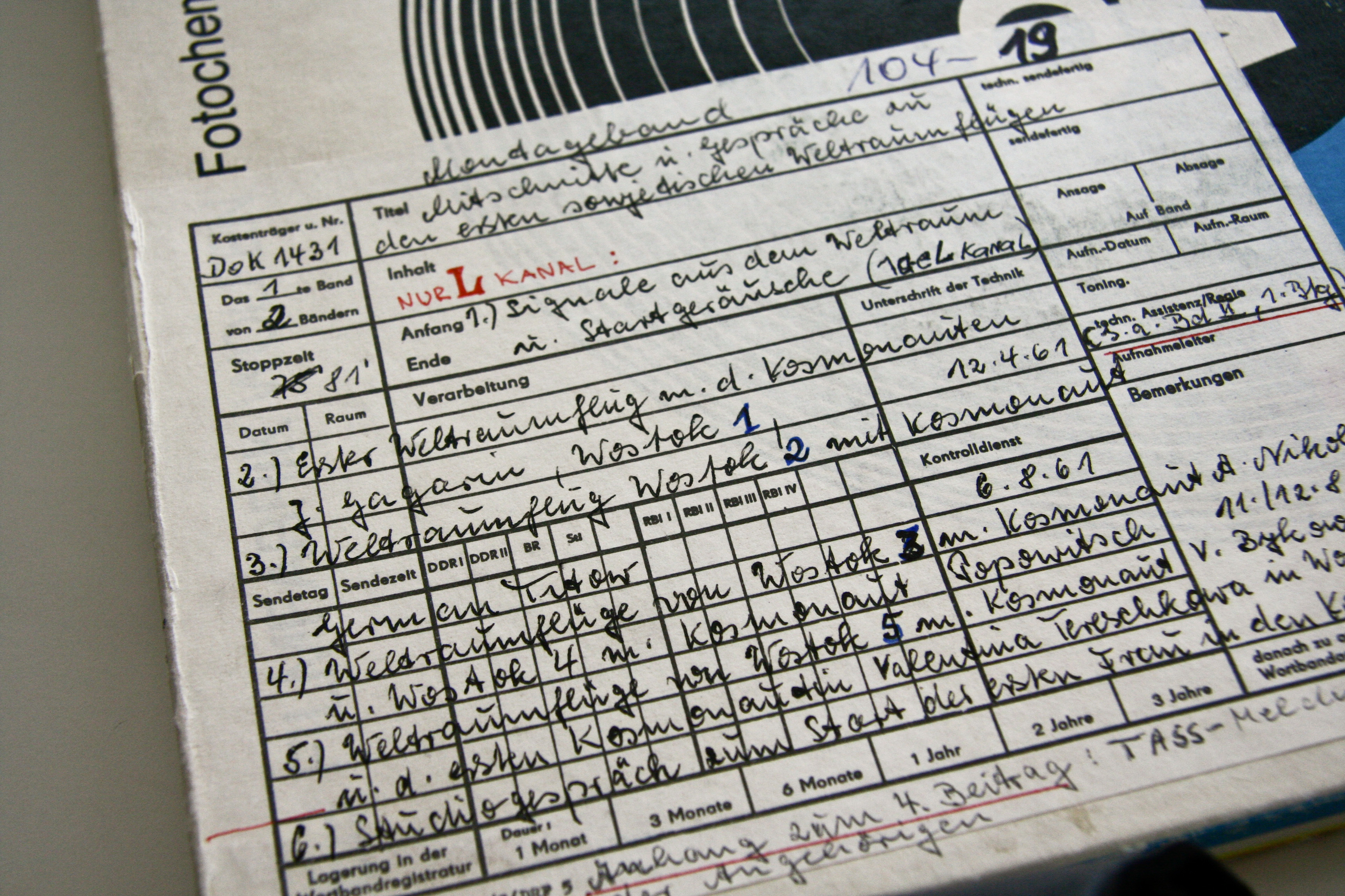 Tonbandkarton mit Archiv-Originaltönen des DDR-Rundfunks anlässlich Juri Gagarins Weltraumflug 1961. Das Band liegt im Deutschen Rundfunkarchiv DRA, Potsdam.